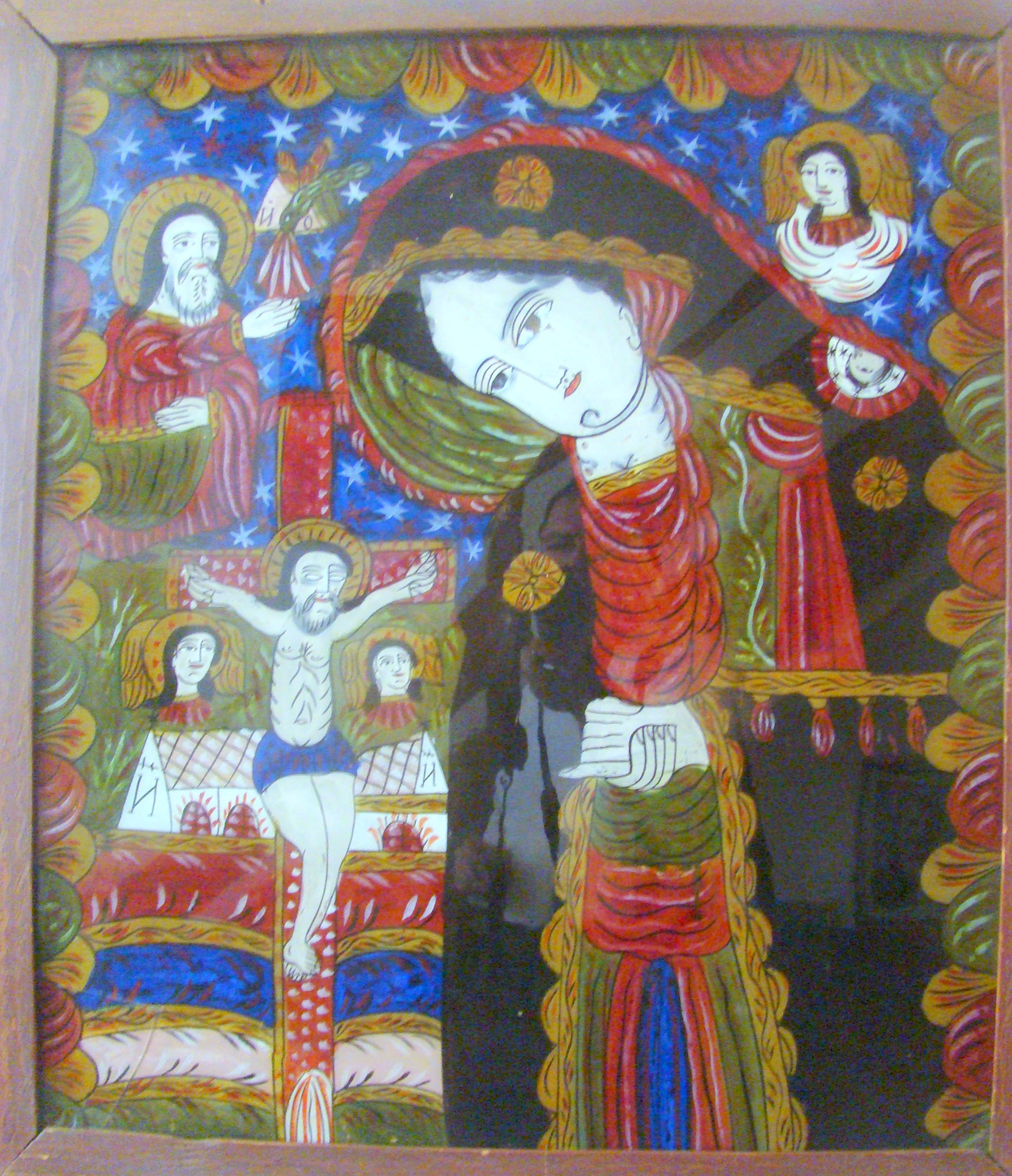 Muzeul de icoane pe sticlă „Pr.Zosim Oancea” din Sibiel